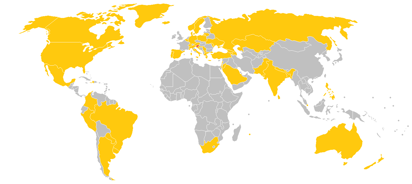 Države s častnimi konzuli Republike Slovenije